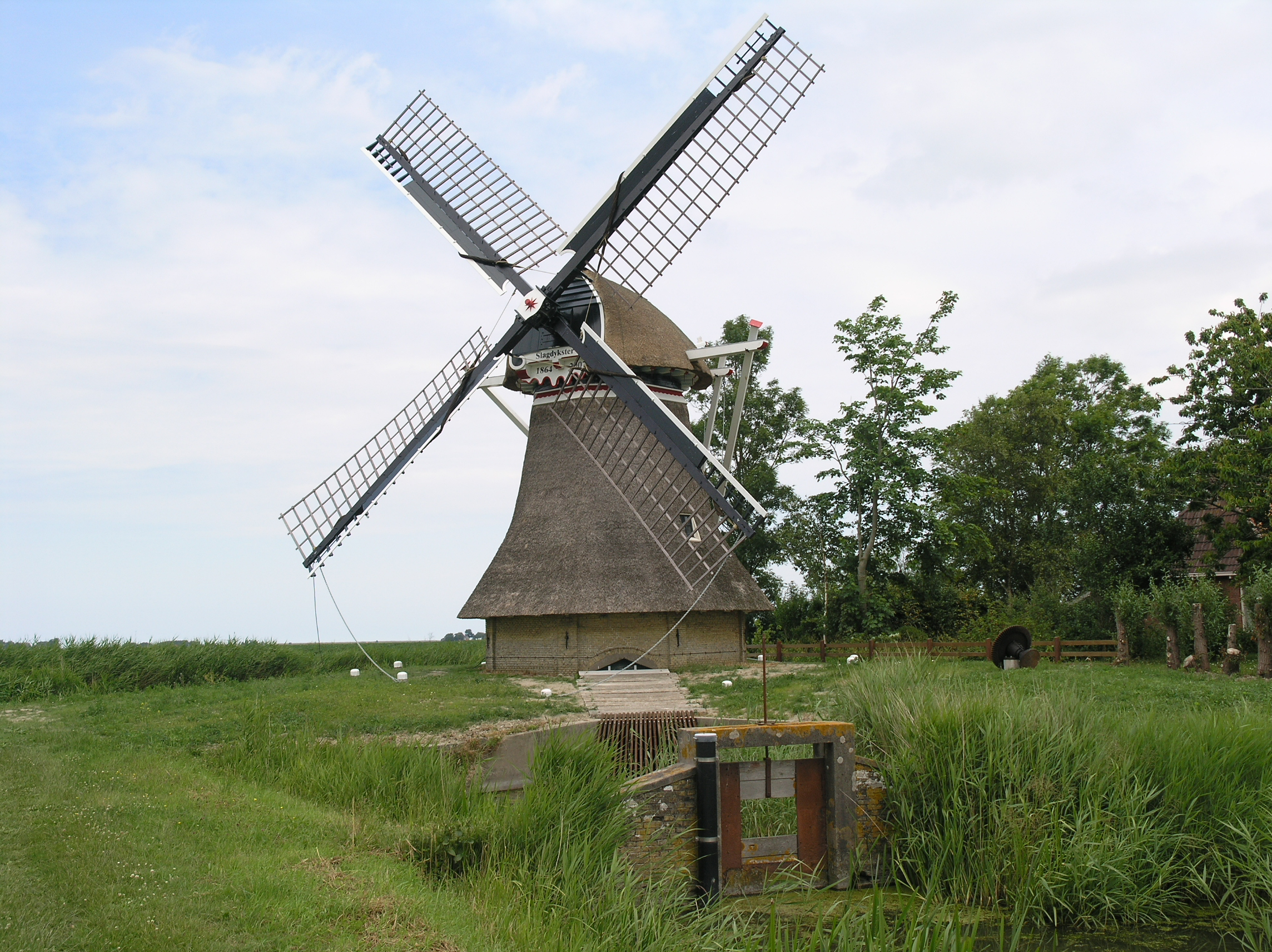 Finkum Poldermolen Slagdijkstermolen